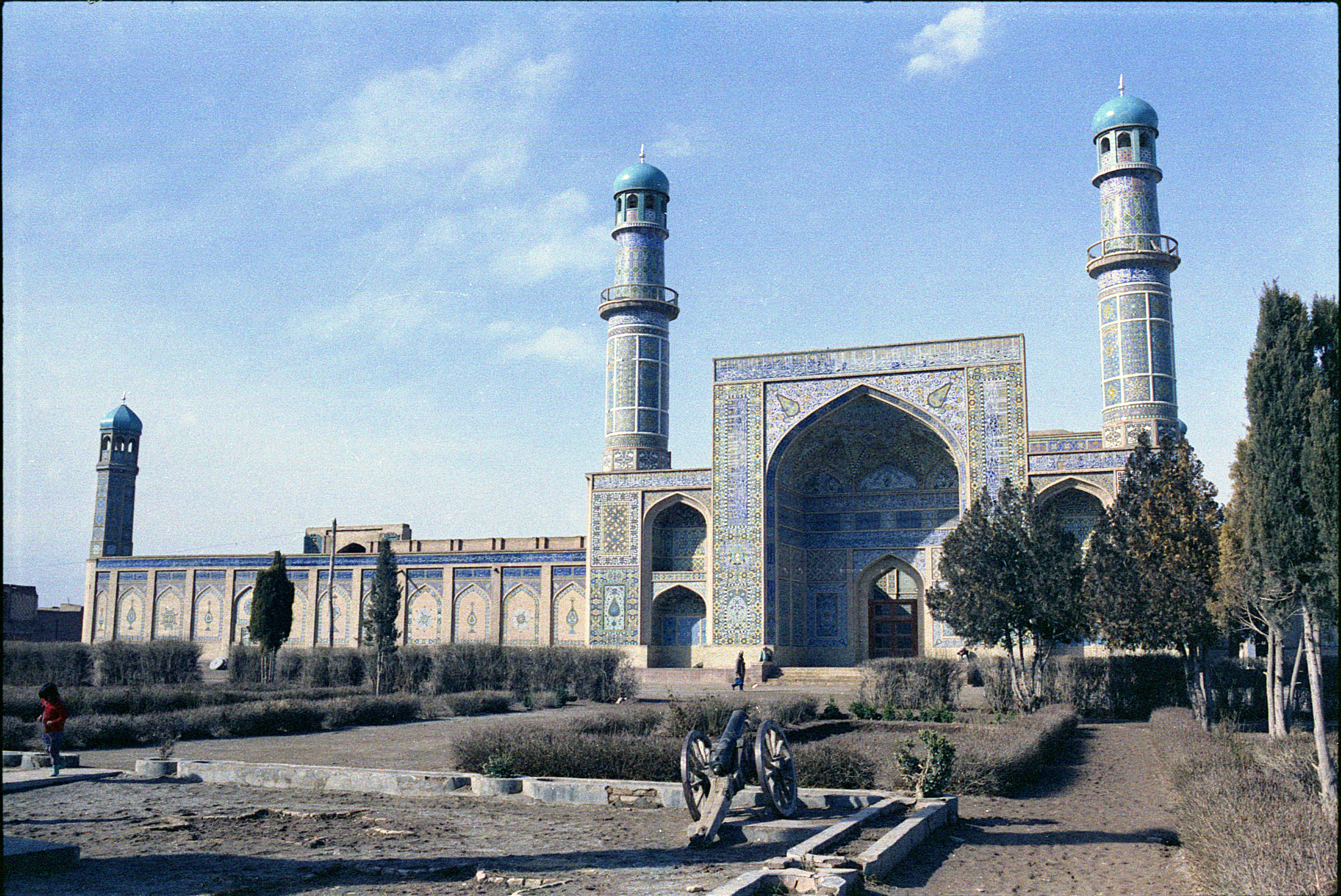 Afghanistan, herat, la grande mosquée du vendredi en 1974Afganistán, herat, la gran mezquita del viernes en 1974